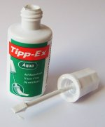 Ein Fläschchen Korrekturflüssigkeit, wasserbasierend, mit Korrekturschwämmchen im Deckel [A bottle correction fluid, water based, with foam applicator in cap]